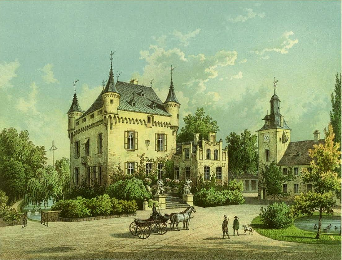 Schloss Lörsfeld, Kreis Bergheim